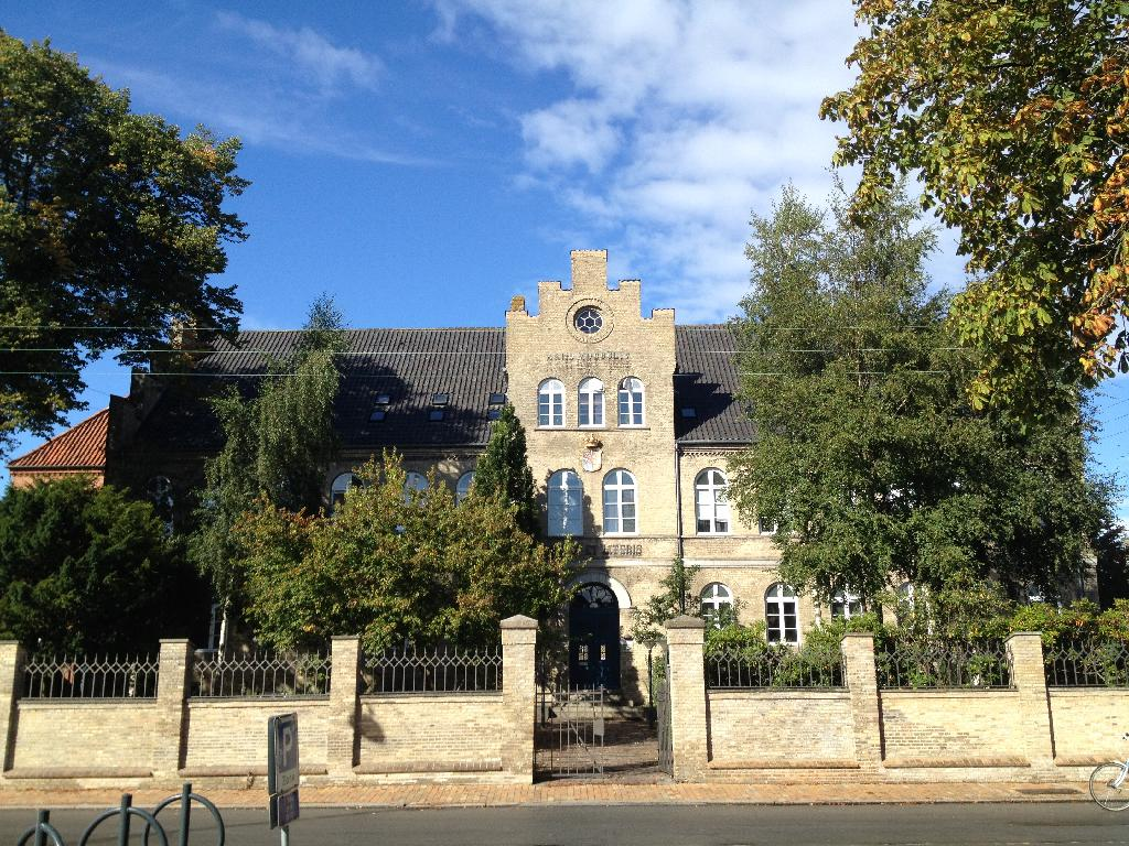 Den tidl. Katedralskole, Gåskærgade 28, Haderslev, Dänemark.